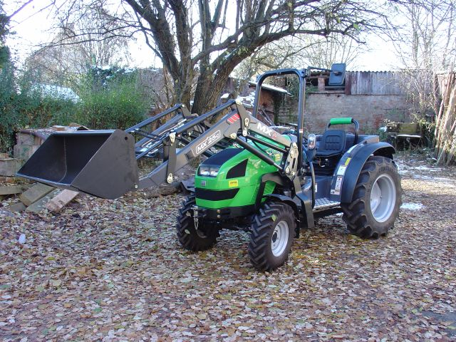 Agrokid 30 von Deutz-Fahr mit MX-Frontlader